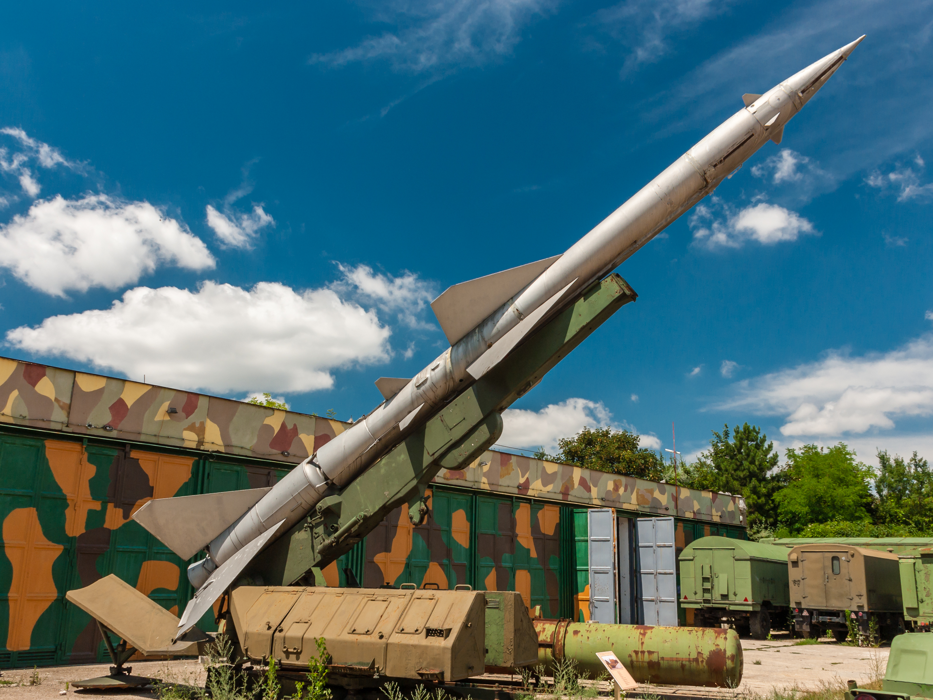 SZ–75 Dvina szovjet közepes hatótávolságú légvédelmi rakétarendszer a zsámbéki rakétabázison a Földi Telepítésű Magyar Légvédelmi Fegyvernem Múzeumának Honi Légvédelmi Parkjában 2011 júliusában